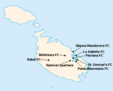 Répartition des clubs en First Division Maltaise 1962-1963.